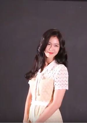 [TV10] 황찬성과 키스 두 번한 경수진, "한주완이 더 잘해"('로맨틱 보스' 제작발표회)